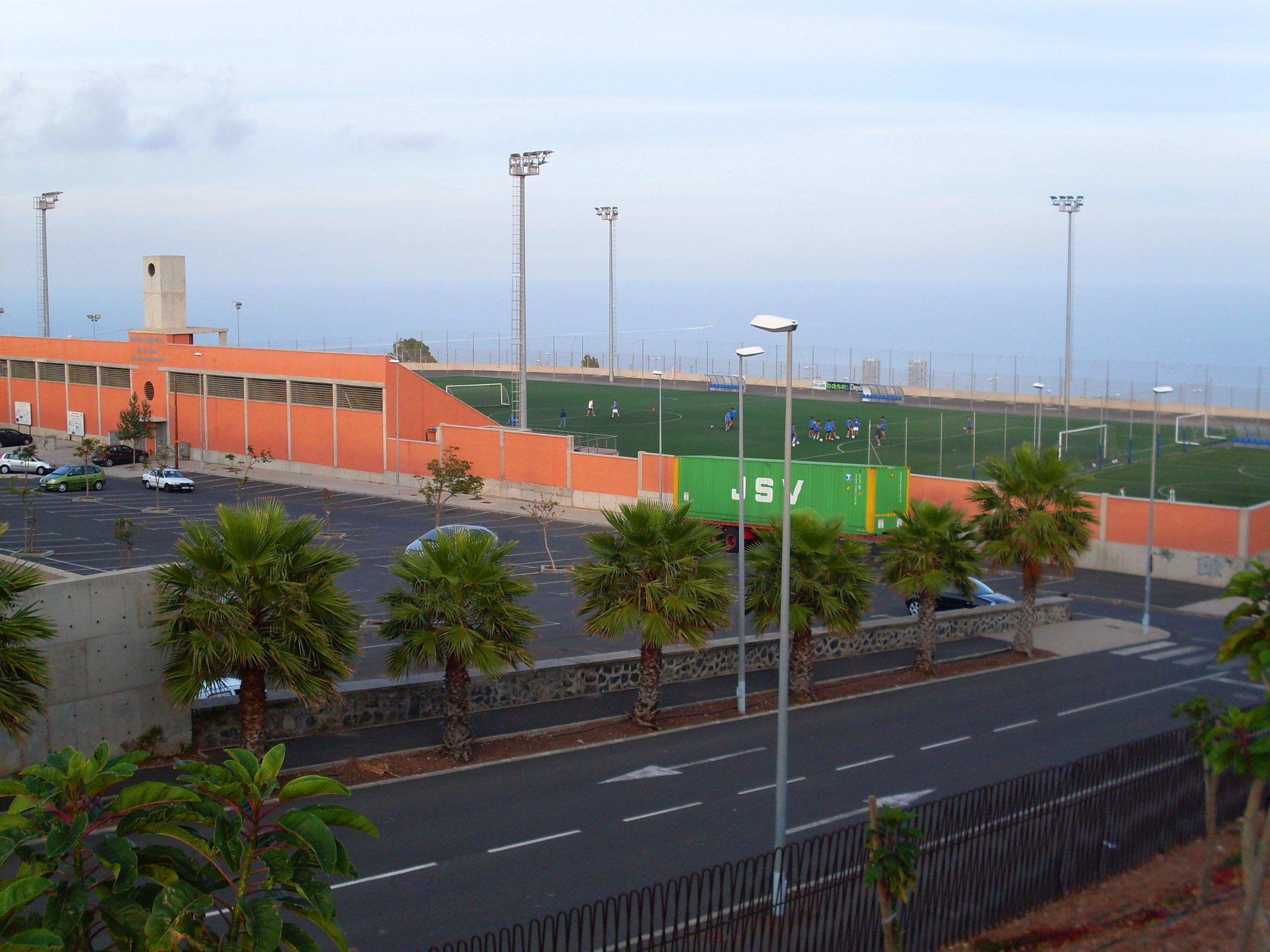 Panorámica del Campo Municipal de Fútbol Sebastián Hernández Brito (San Cristóbal de La Laguna).